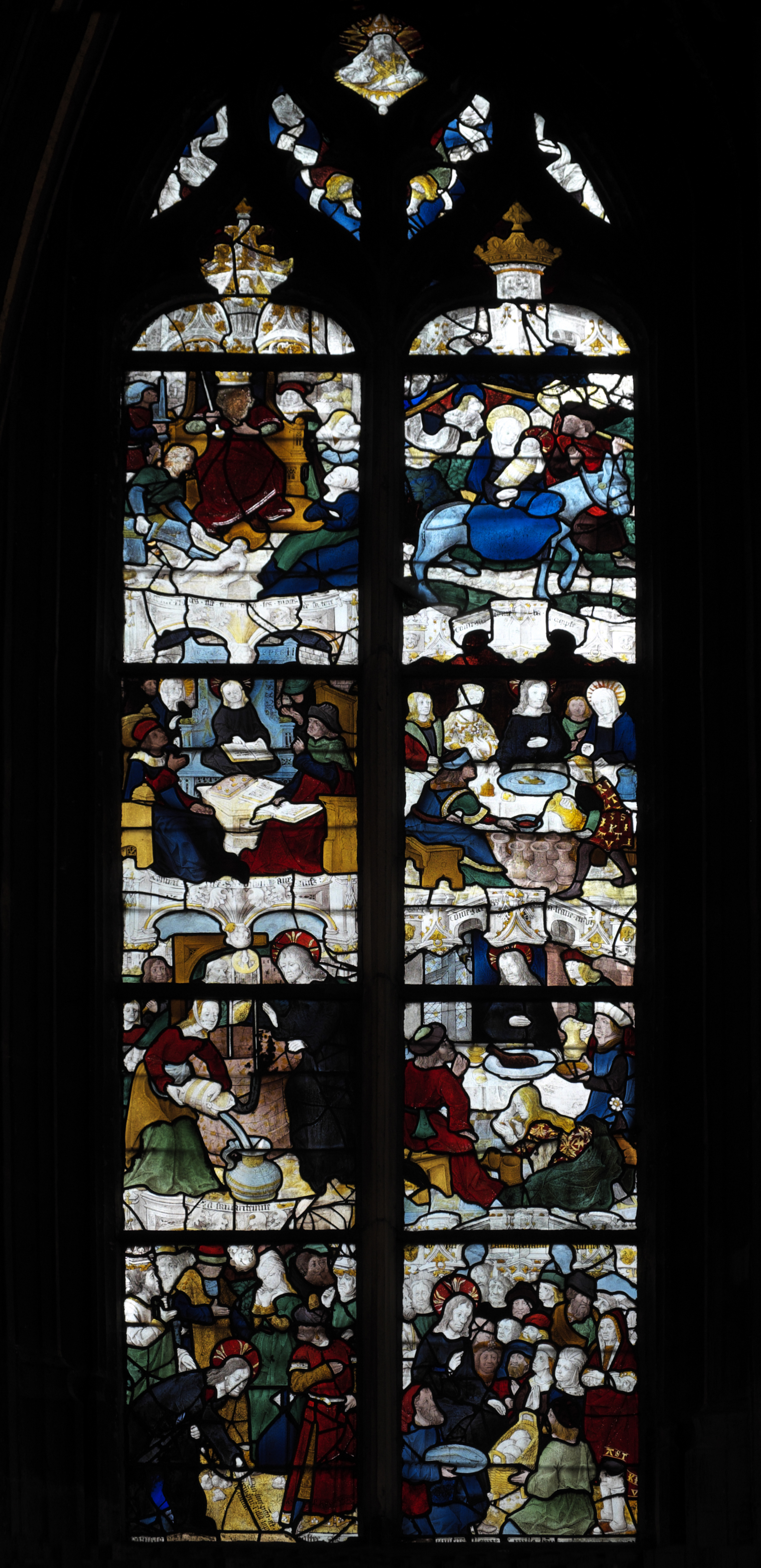 Katholische Kirche Saint-Pierre in Dreux im Département Eure-et-Loir (Centre-Val de Loire/Frankreich), Bleiglasfenster (baie 1) aus dem letzten Viertel des 15. Jahrhunderts von Pierre Courtois; Darstellung: Szenen aus dem Leben Jesu (Tötung der Unschuldigen Kinder, Flucht nach Ägypten, Jesus unter den Schriftgelehrten, Hochzeit von Kana, Jesus und die Samariterin, Gastmahl bei Simon dem Pharisäer, Jesus und die Ehebrecherin, Brotvermehrung; im Maßwerk: Gottvater)